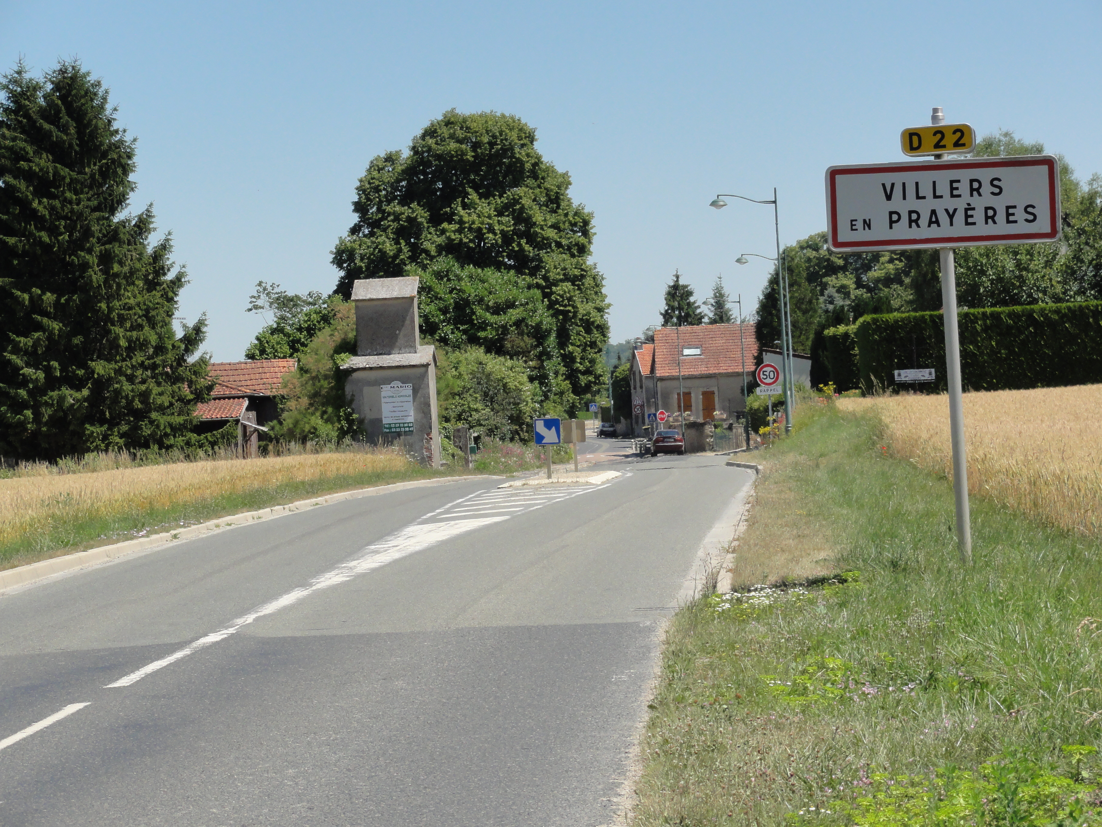 Villers-en-Prayères (Aisne) city limit sign